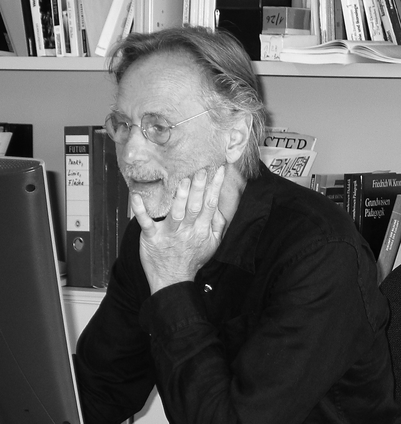 Wolfgang Reiß an seinem Schreibtisch